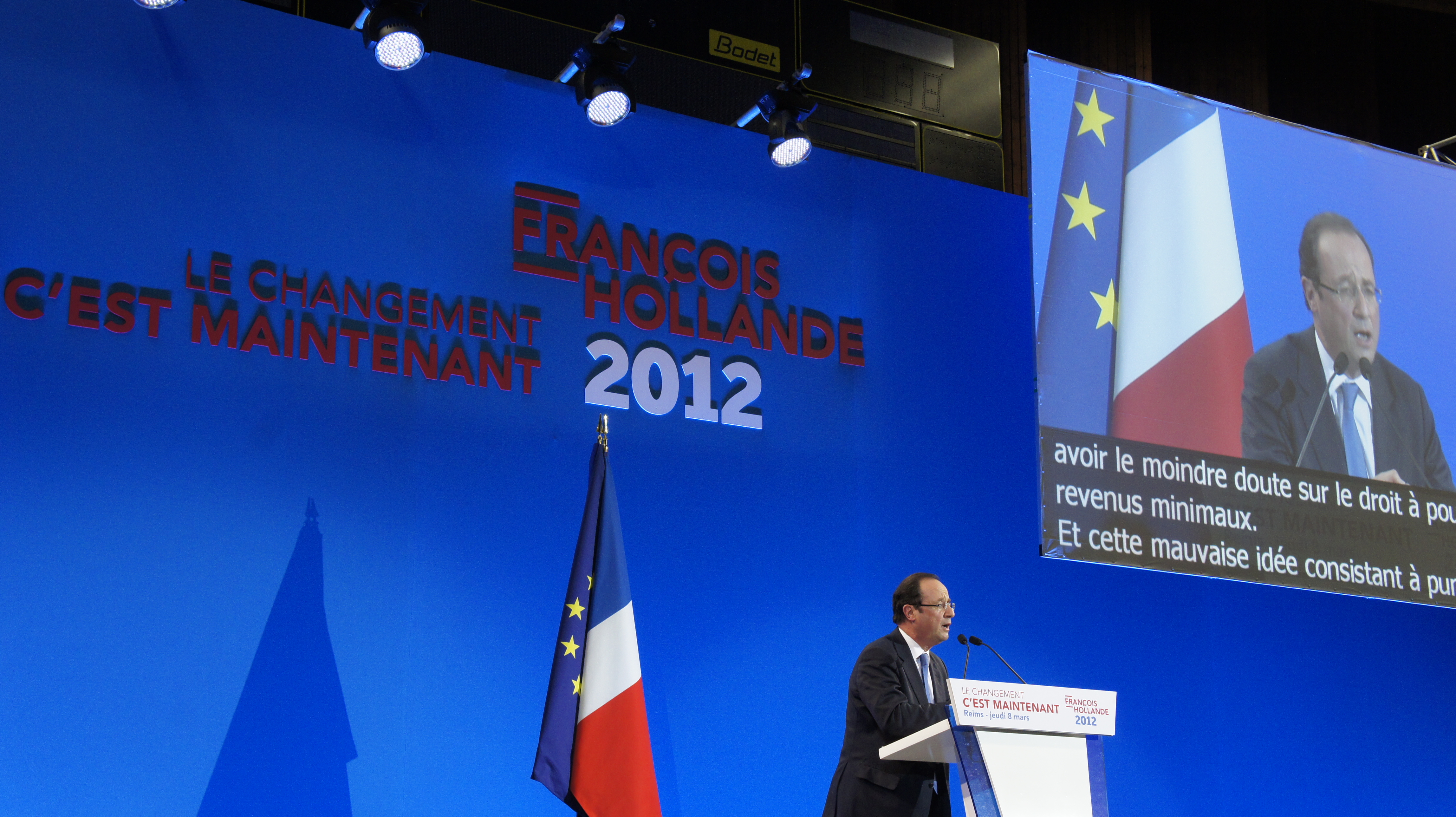 Réunion publique du candidat François Hollande à Reims.